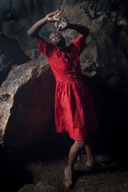 Vodou in Haiti, Les Stone